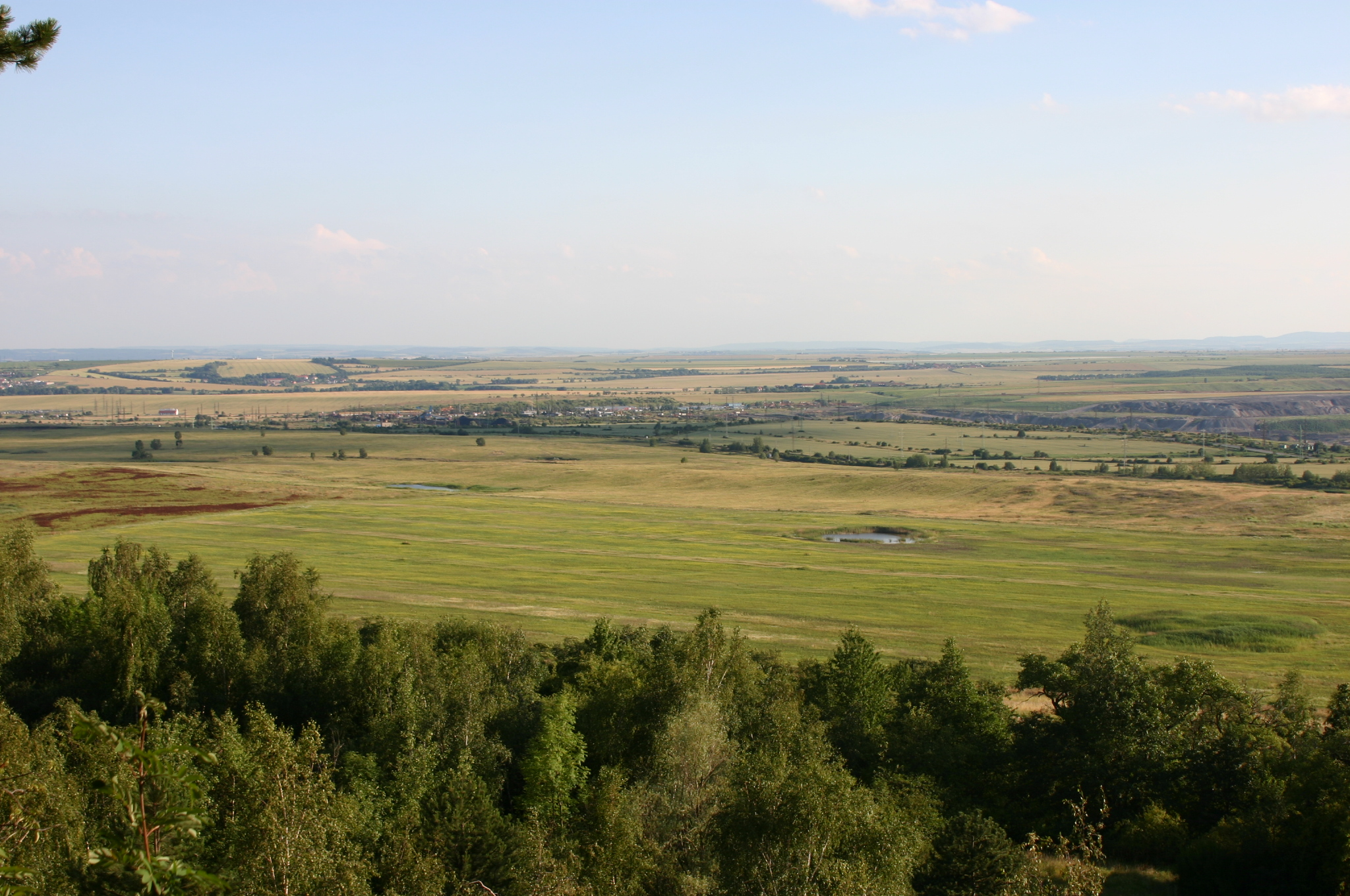 Platz der ehemaligen Gemeinde Deutsch-Schladnik (Slatinice) im Bezirk Brüx.